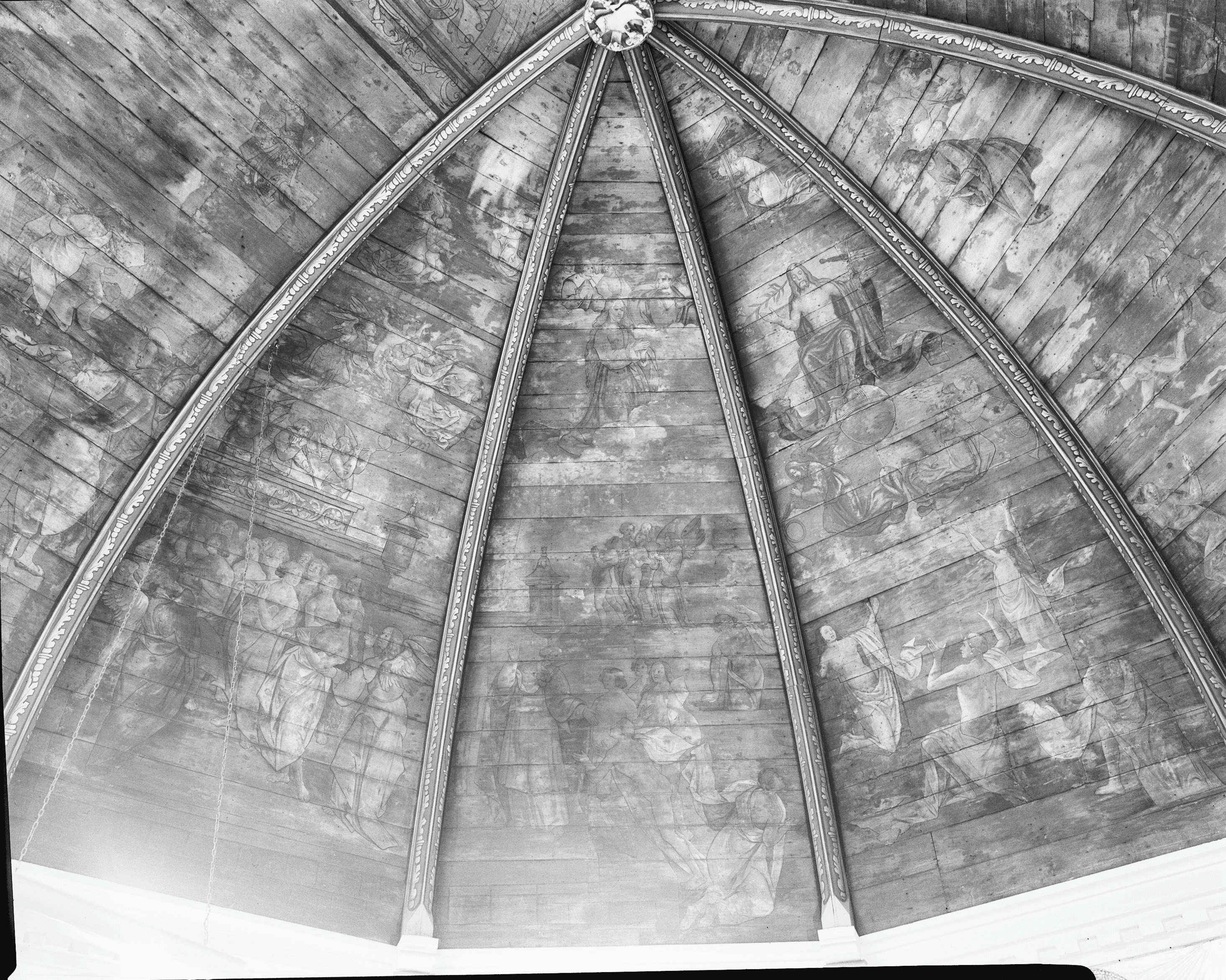 Nederlands Hervormde Kerk en Toren: gewelfschildering van het koor, aanwezig in Rijksmuseum te Amsterdam (in 1964 weer teruggeplaatst in kerk Warmenhuizen[1])